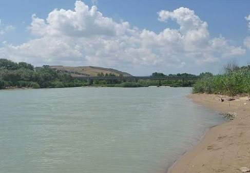 Il fiume Trigno